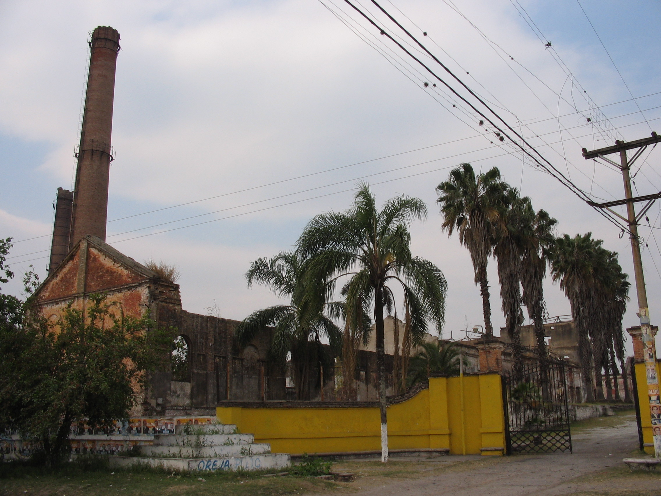 Lastenia2